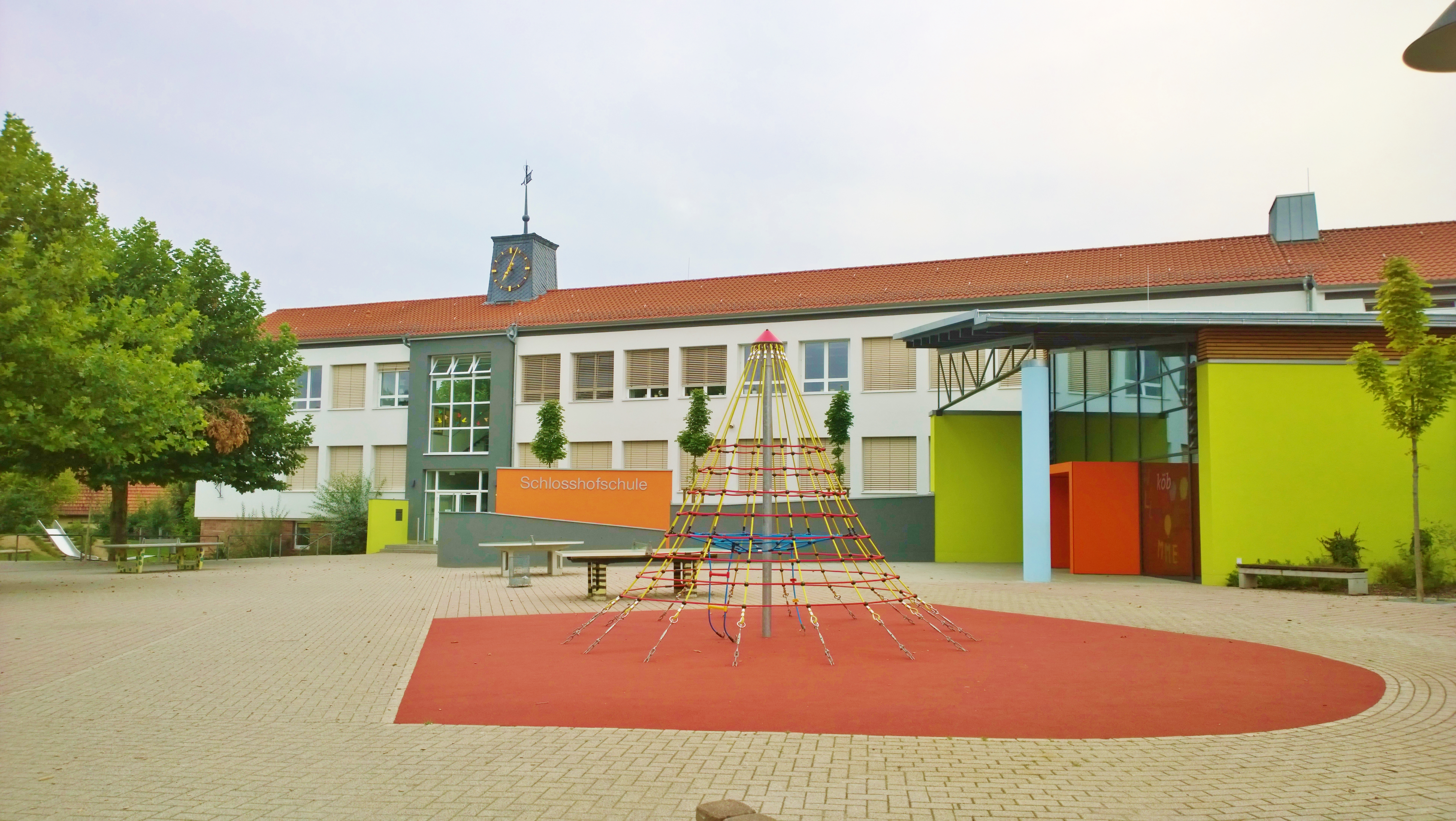 Die Schlosshofschule, hier befand sich früher die Wasserburg